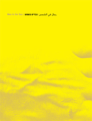 בן צבי, טל, פרח, חנא (עורכים), 2009. גברים בשמש, מוזיאון הרצליה לאמנות עכשווית.